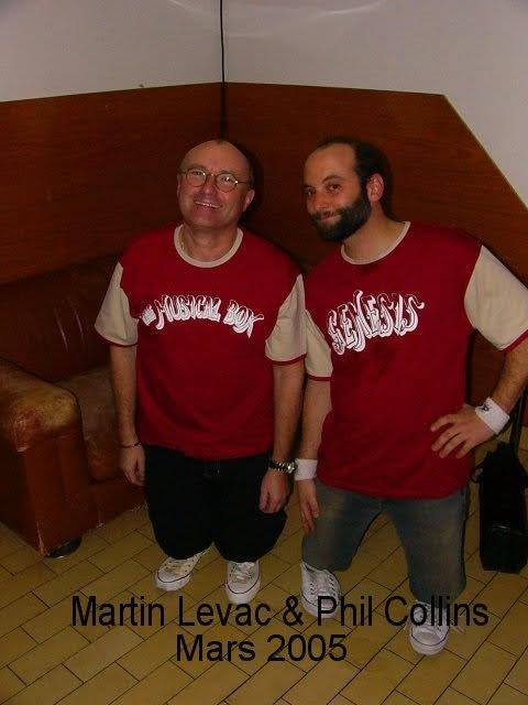 Phil Collins & Martin Levac, Genava, march 2005